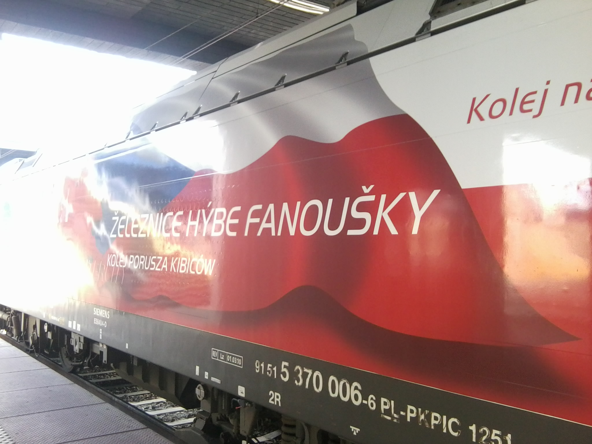 Kolej porusza kibiców w języku czeskim.